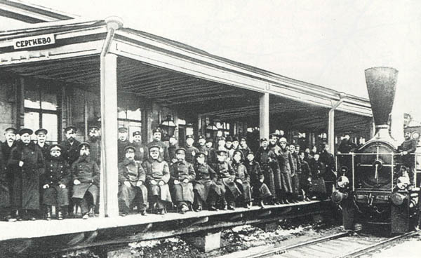 Открытие движения Станция Сергиево (сейчас Сергиев Посад), Московская обл., ТРС (70 км), 1862 г. Из книги «От Москвы до Заполярья»